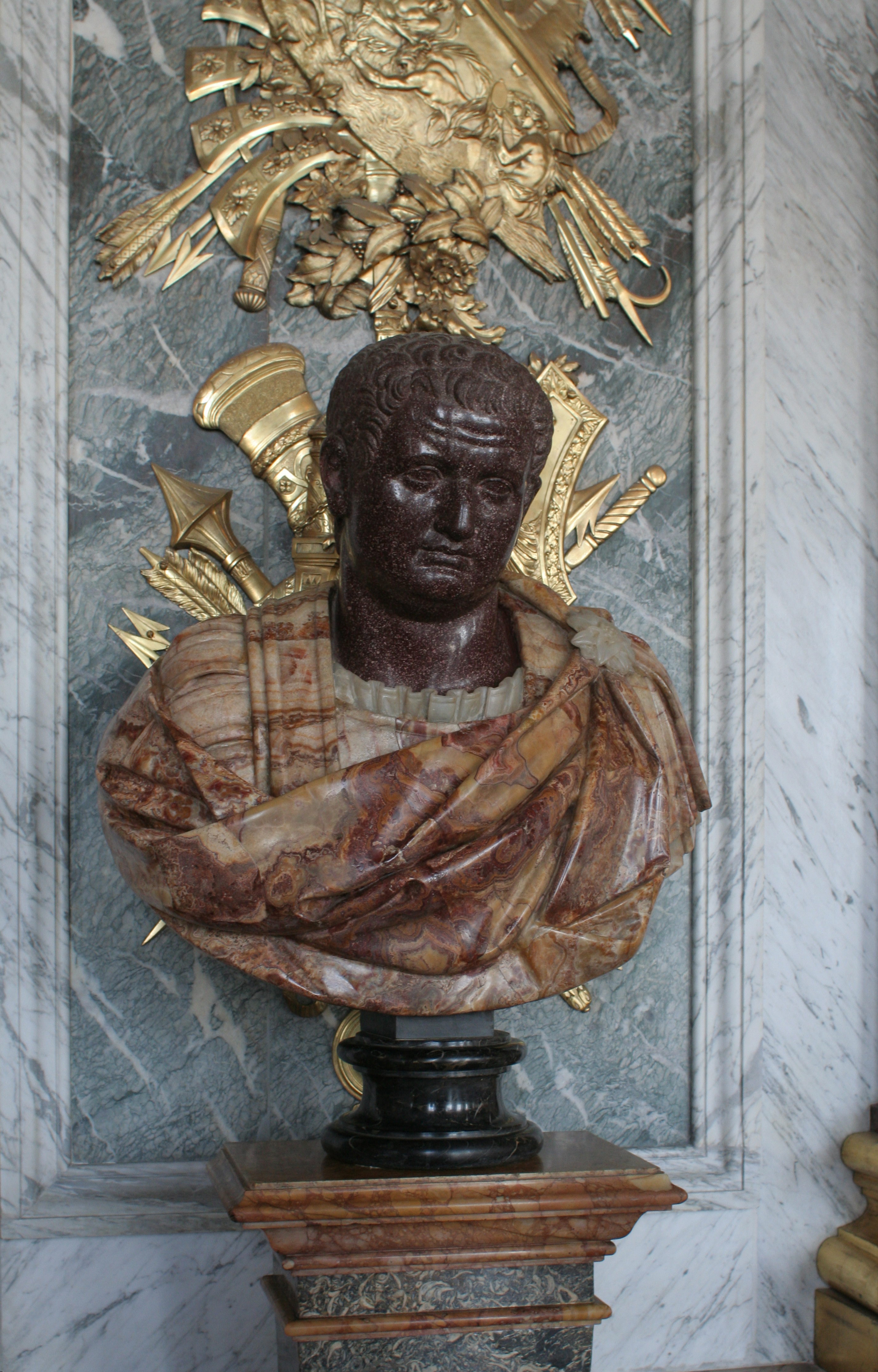 Château de Versailles, galerie des glaces, buste de l'empereur romain Titus. Tête en porphyre, vêtement en onyx et jaspe de Sicile. Gaine en lumachelle orientale de Tunisie, corniche, cimaise et socle en jaune antique de Chemtou (Tunisie). C'est à partir de la tête, considérée comme antique, que François Girardon a exécuté les ornements et draperies.Numéro d'inventaire : MV7105 Length: 0.6 m (27.1 in); Height: 0.9 m (37.7 in); Depth: 0.3 m (14.5 in) dimensions QS:P2043,0.690U11573;P2048,0.960U11573;P5524,0.370U11573 sculpture on marble, sculpture on porphyry